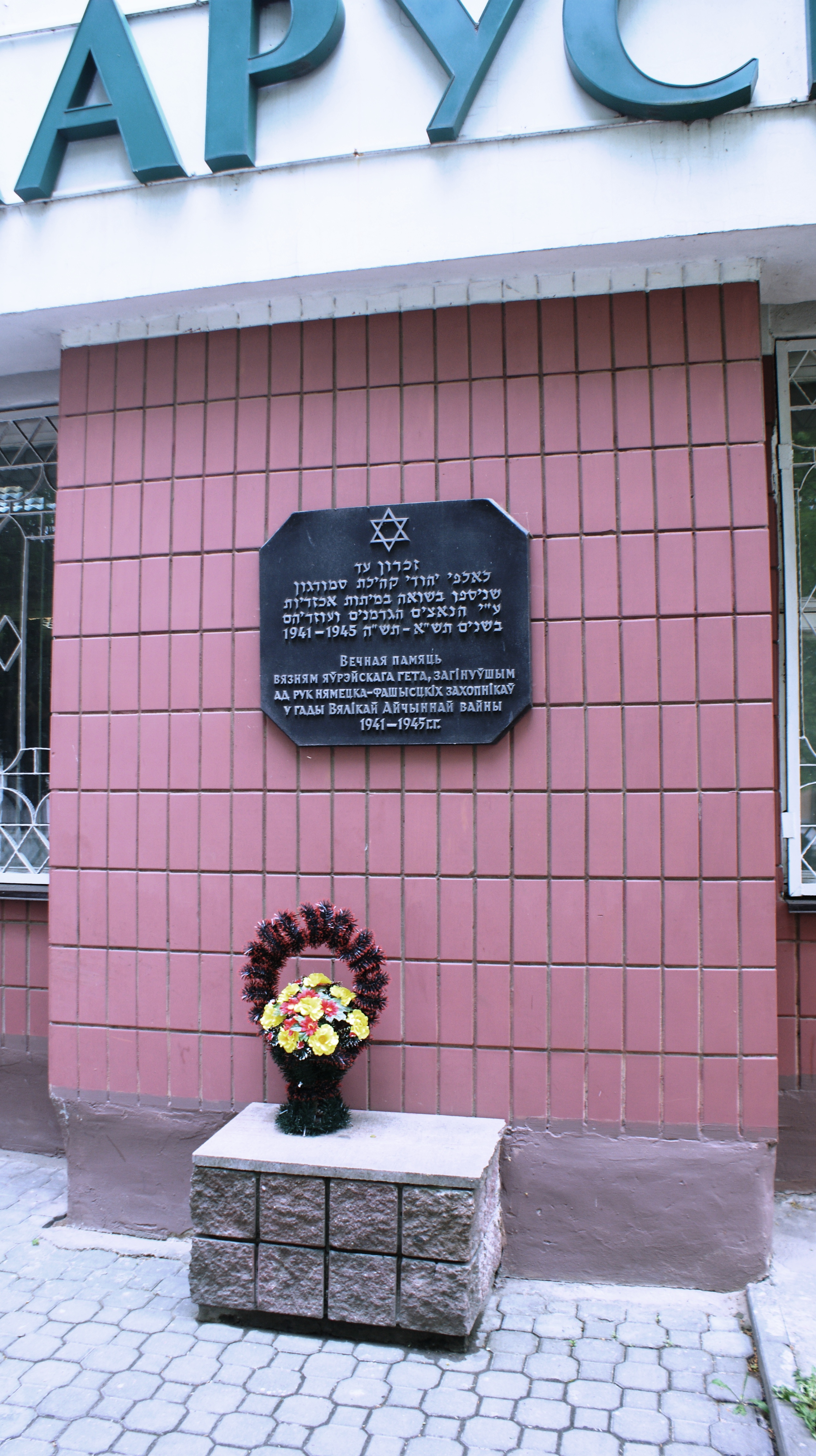 Сморгонь. Мемориальная доска в память евреев - узников Сморгонского гетто. Размещена на здании банка на улице Советской, 3а.